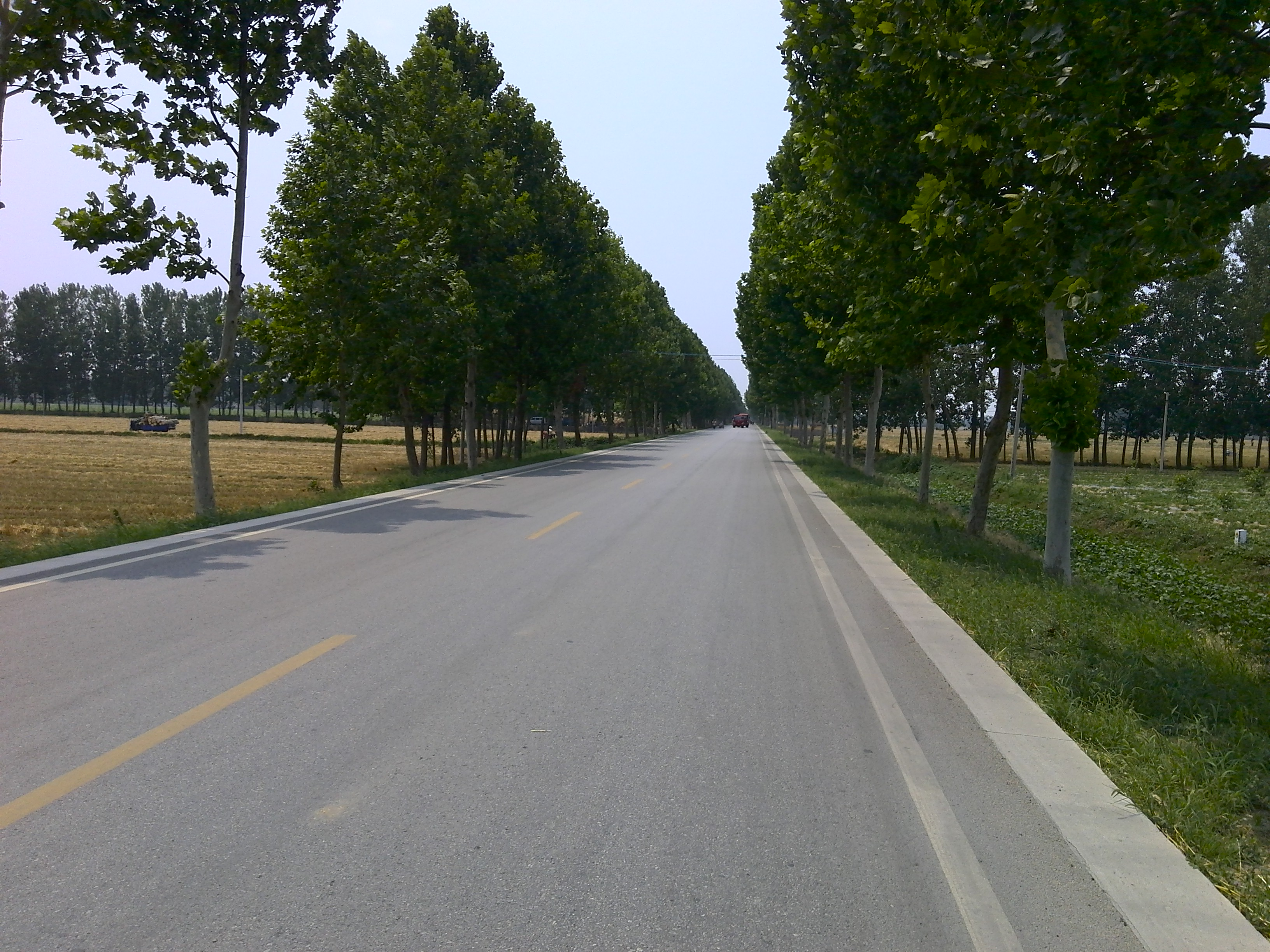 中文（中国大陆）: 省道331东平县彭集街道段